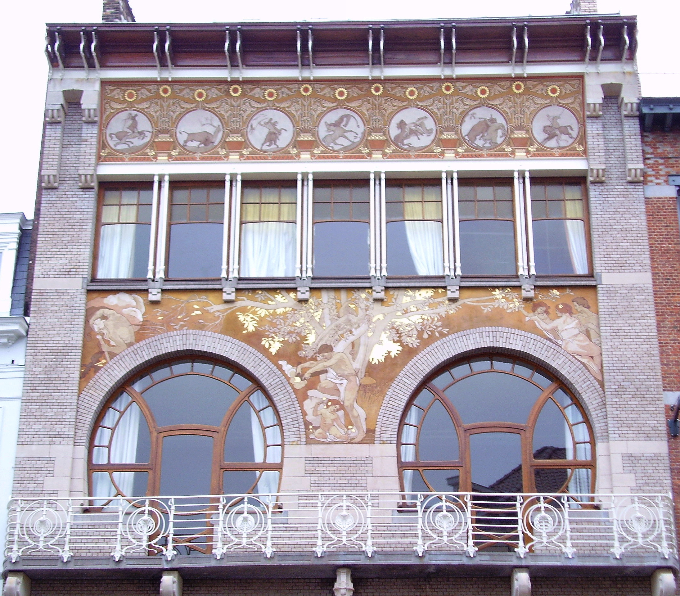 Sgraffites de l'Hôtel Ciamberlani (1897 - Architecte: Paul Hankar). Rue Defaqz, commune d’Ixelles, Bruxelles/ après rénovation fin 2006